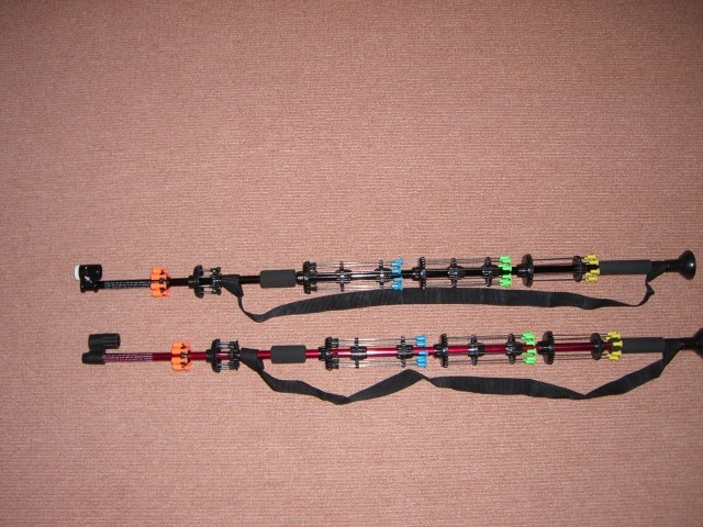 Sport-Blasrohr